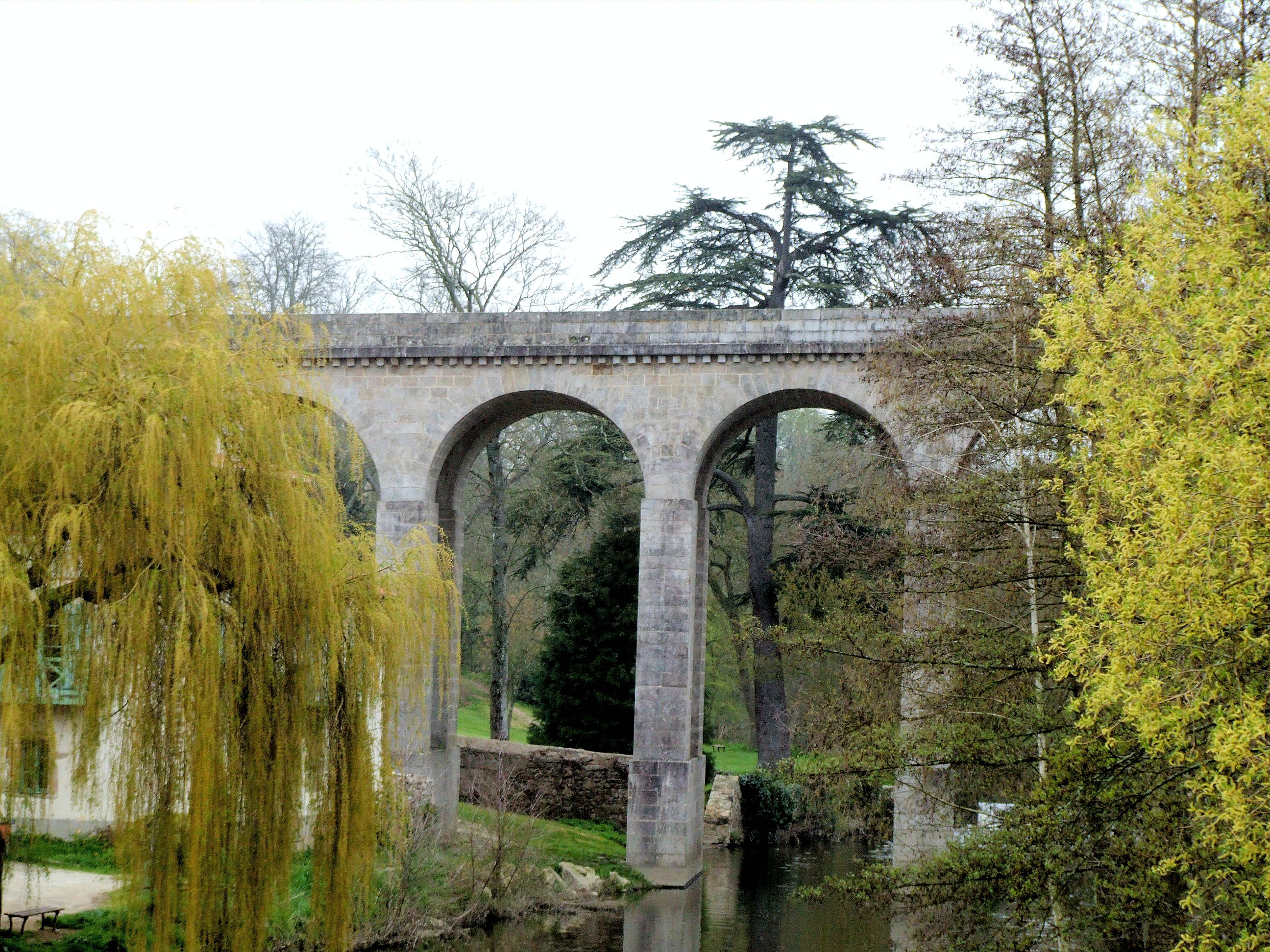 Clisson - Viaduc de Clisson sur le Moine